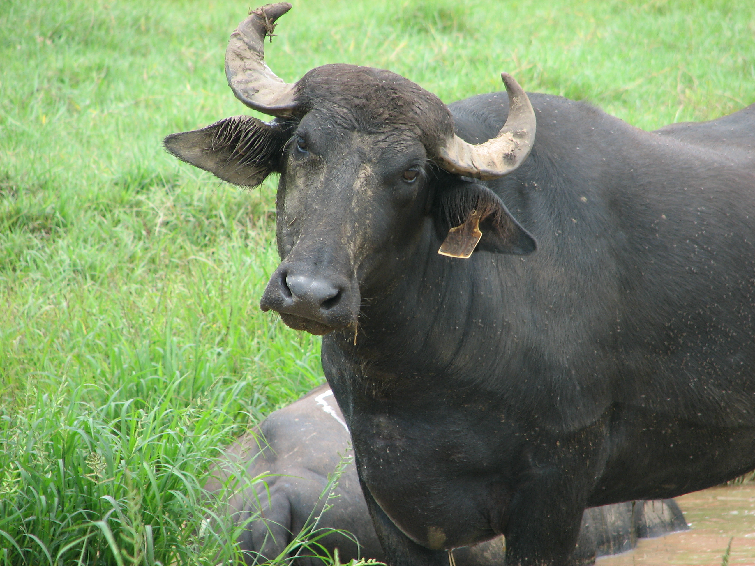 Water Buffalo at Fogg Dam.